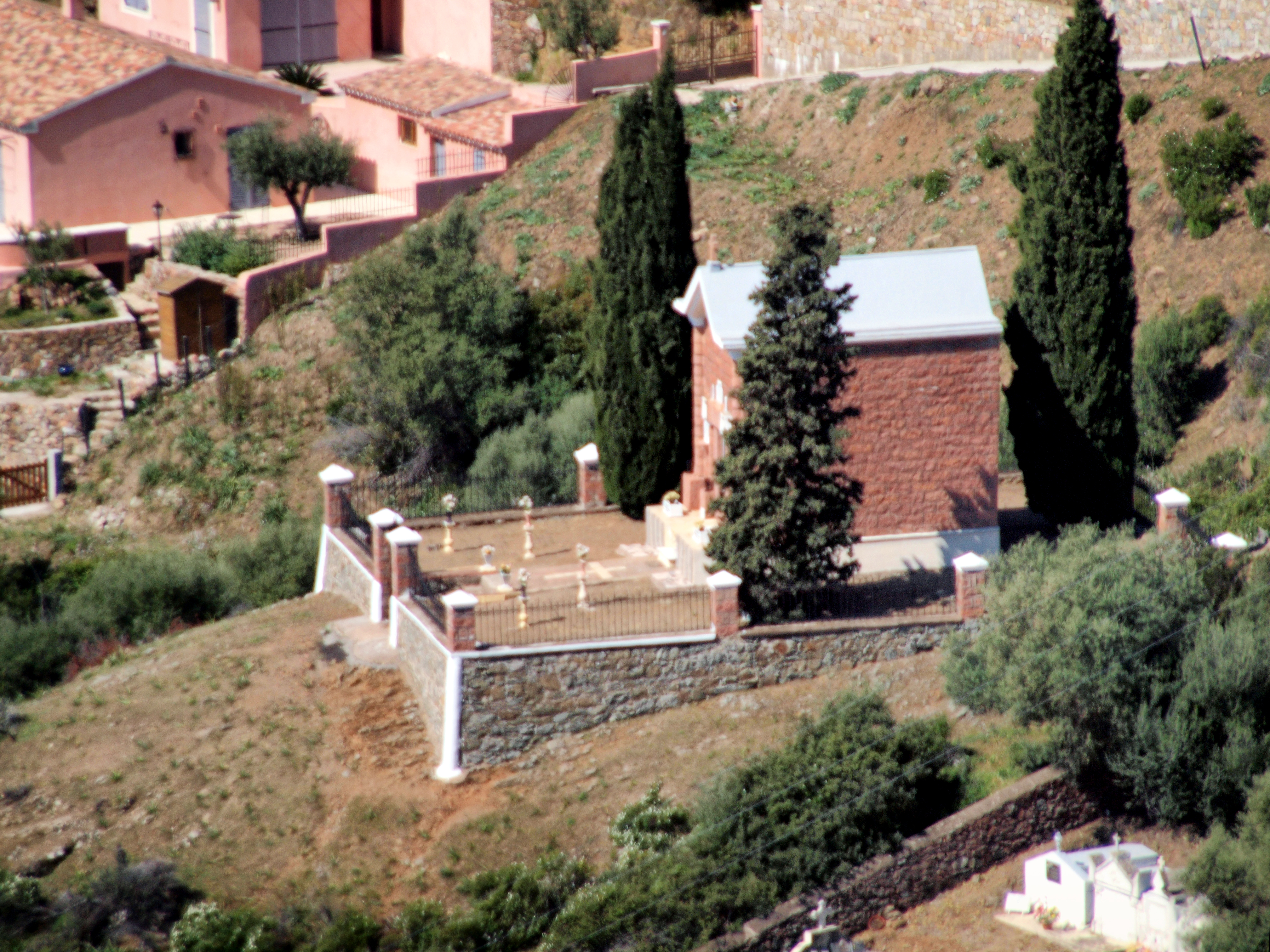 Osani, Ouest Corse - La tombe de Lorenzo, sujet d'une légende